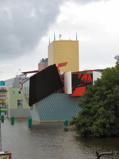 Zelf gemaakte foto van het Gronings Museum in 2004